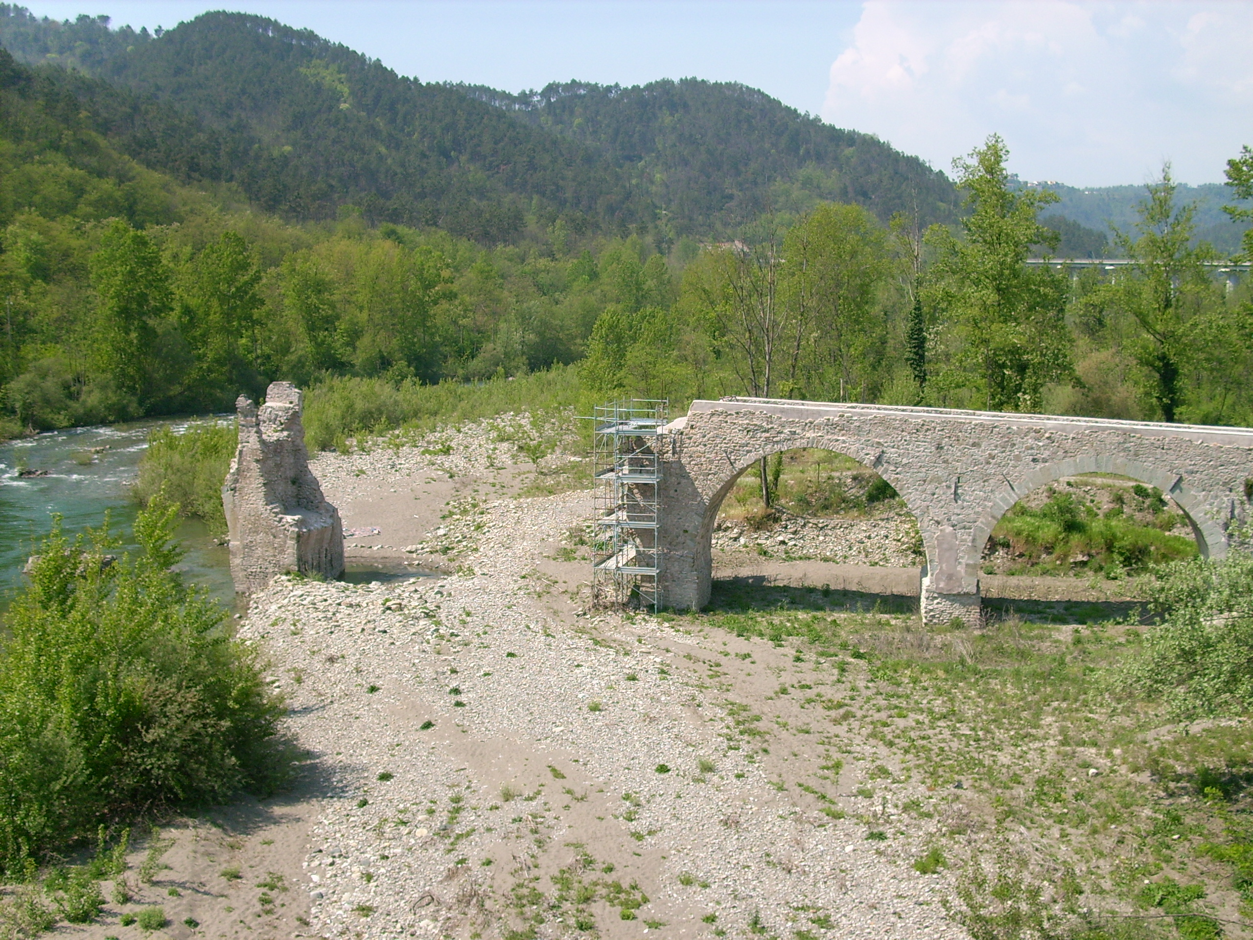 Antico ponte romano presso Brugnato, Liguria, Italia